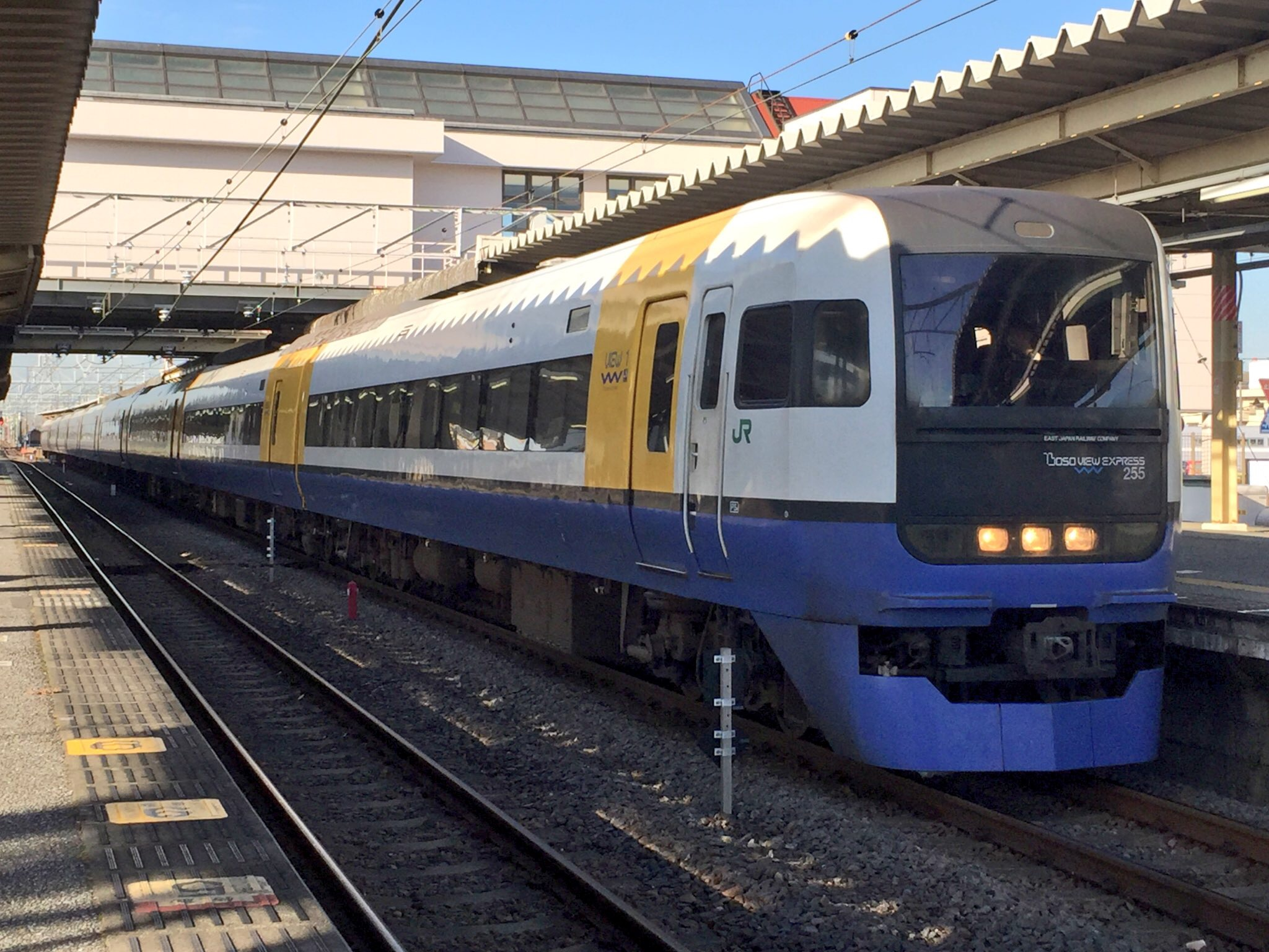 特急さざなみ4号東京行き 内房線姉ケ崎駅